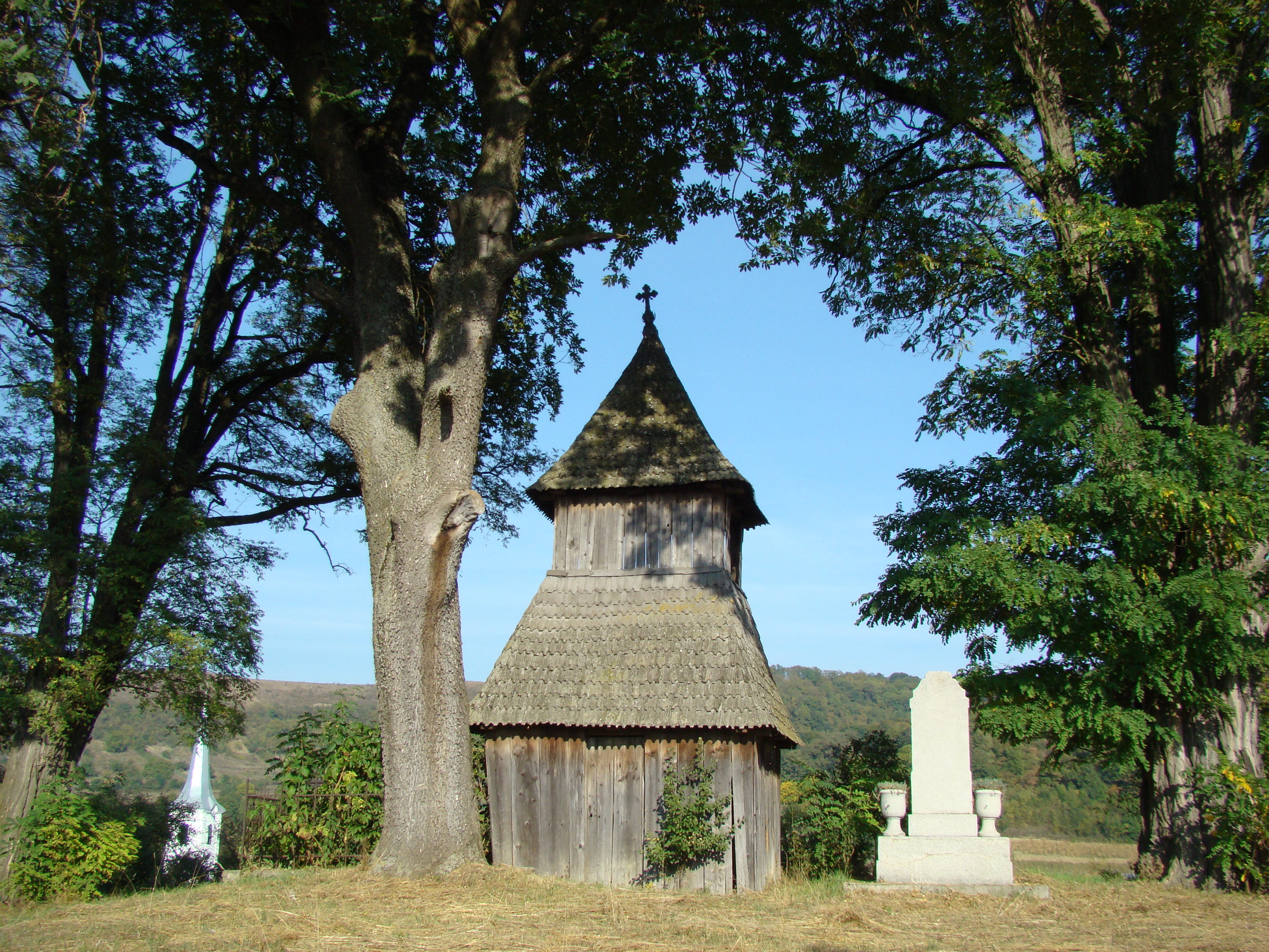 Biserica de lemn „Sf.Arhangheli” din Pănet-județul Mureș